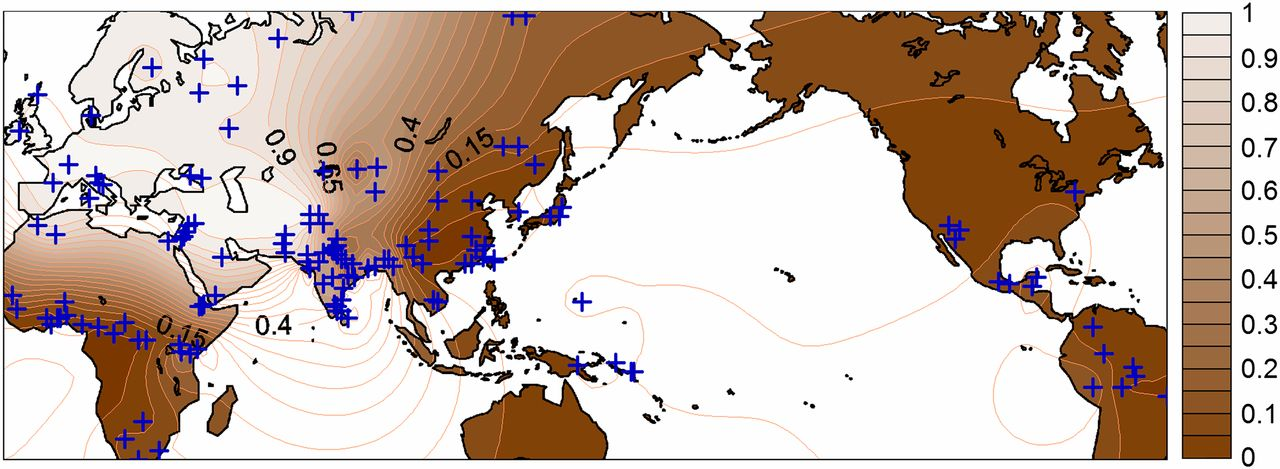 Распространение A111T SLC24A5 - гена светлой кожи. На карте более светлый участок соответствует более светлой коже людей.